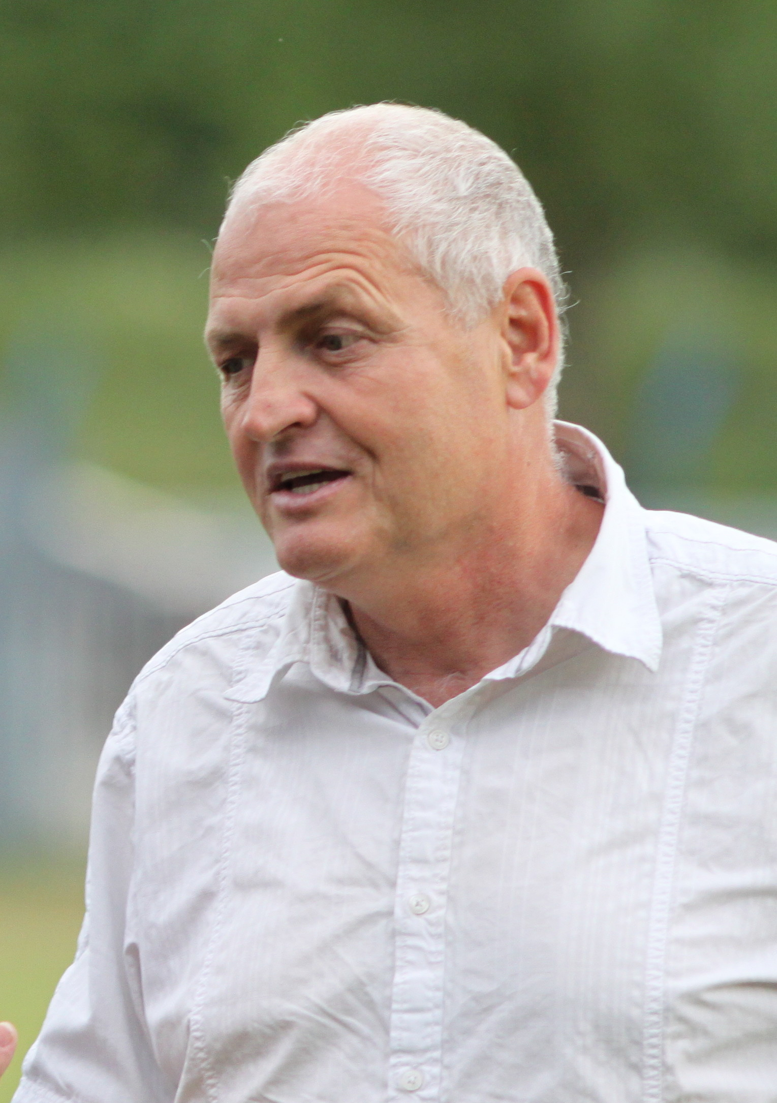 Валери Дамянов-бивш български футболист, понастоящем треньор